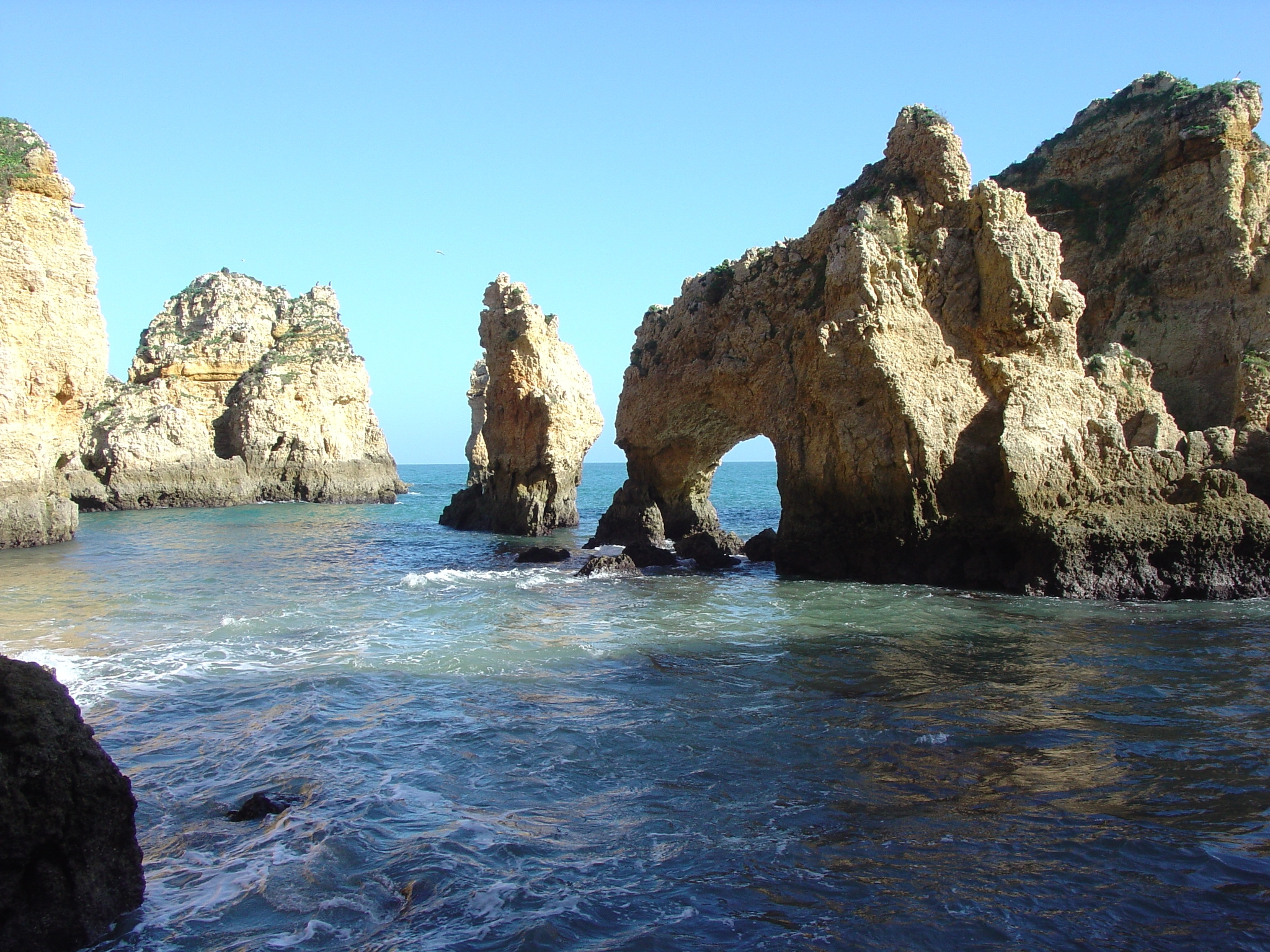 Falésias da Ponta da Piedade, paisagem de Lagos, no Algarve, Portugal.